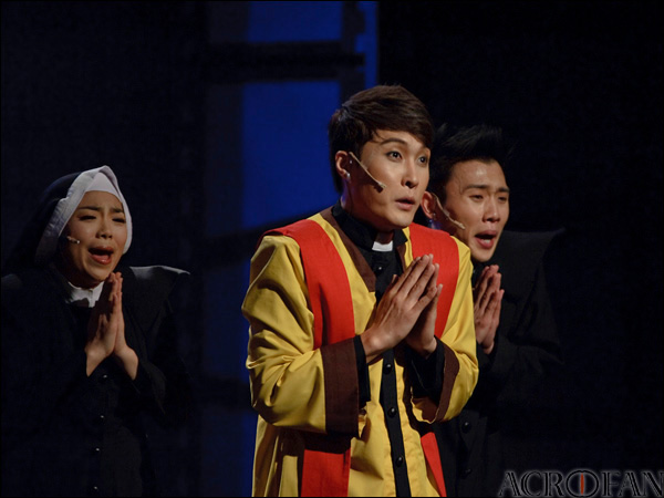 두드림러브(Do Dream Love) 시즌 2 프레스 콜